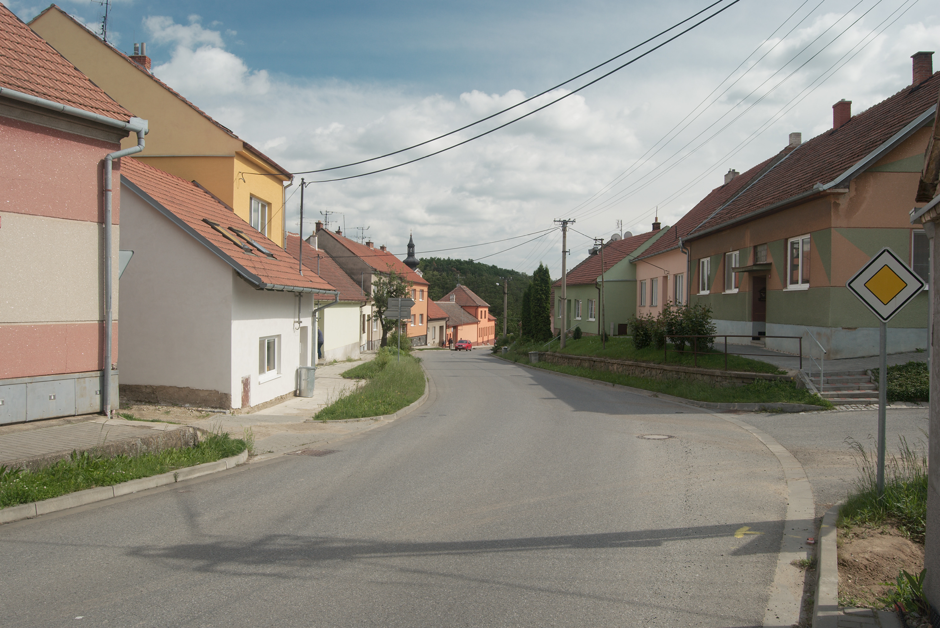 Ořechov - Tikovická ulice v bývalé obci Tikovice, vyfotografovaná od severu